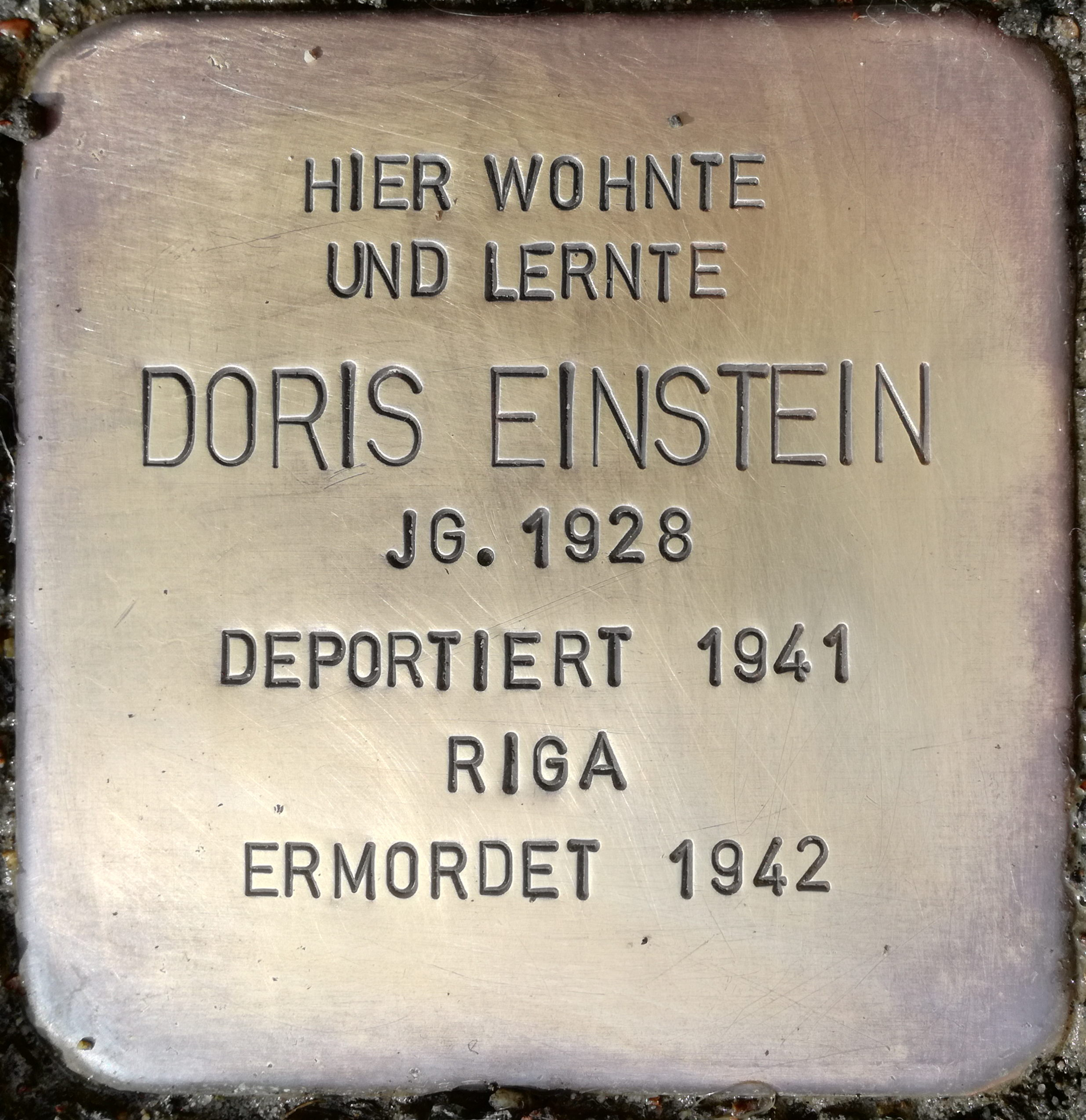 Hier wohnte und lernte Doris Einstein Jahrgang 1928 deportiert 1941 Riga ermordet 1942